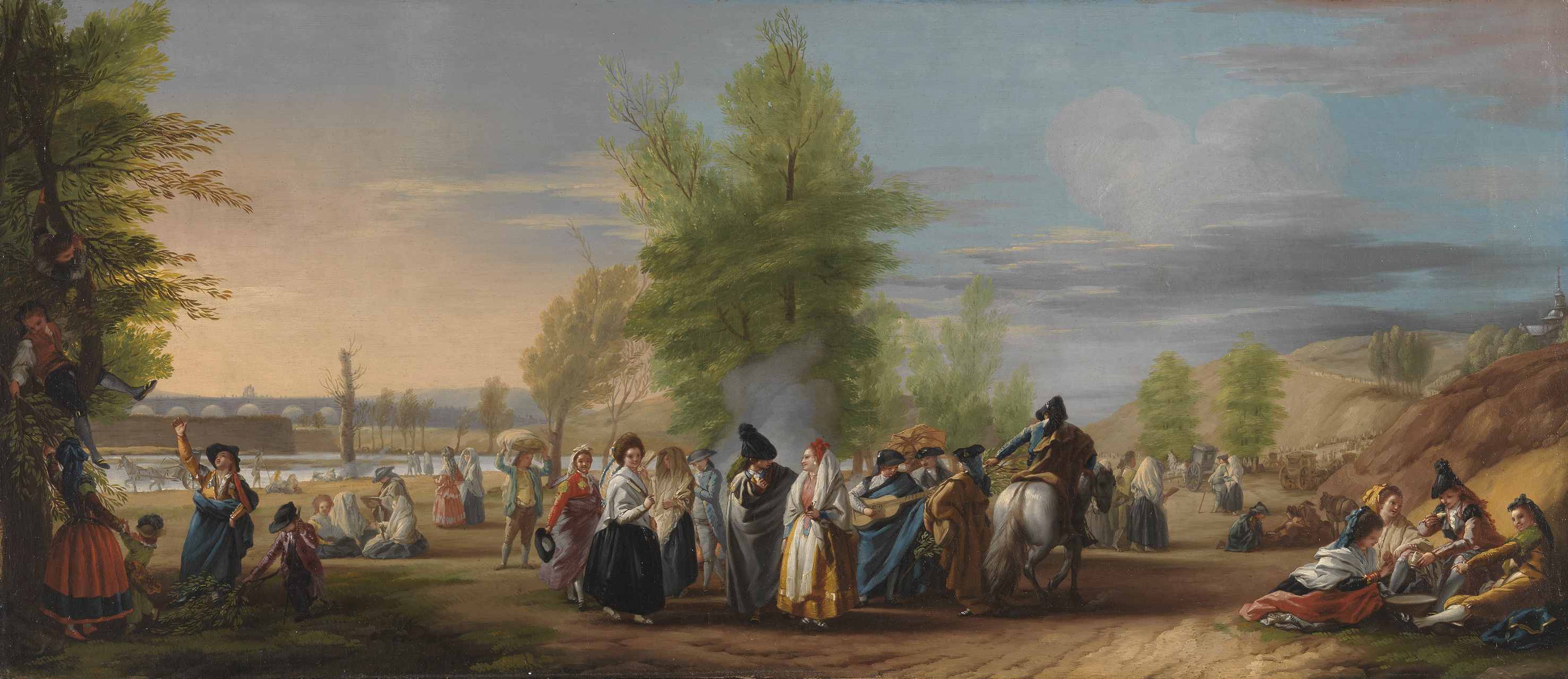 Representa el mismo asunto de la versión posterior de Goya (P00750), de 1788, el de los aledaños de la ermita del santo patrono de Madrid, hacia las orillas del río Manzanares, en el día de su fiesta, el 15 de mayo. Numerosos grupos de majos y majas se divierten cantando, comiendo y paseando a orillas del río, con una figura destacada de azul en el centro de la composición, que toca una guitarra alargada de mástil oscuro, rasgos típicos de las guitarras del siglo XVIII. El concepto de paisaje urbano difiere del de Goya, que pretendió una vista general de Madrid al fondo, y la pradera en primer término, con todo el bullicio del pueblo el día de fiesta. Castillo recurrió a un paisaje genérico, con árboles de jardín y pocos grupos de figuras, aunque al fondo se divisa la silueta del puente de Toledo. Es un boceto preparatorio para el cartón para tapiz (P03932), destinado éste al dormitorio del Infante en el Palacio de El Pardo, de dimensiones excepcionales, propiedad del Museo del Prado y depositado en el Museo Municipal de Madrid (Texto extractado de Mena, M.: Goya y la pintura española del Siglo XVIII. Guía, 2000, p. 132).